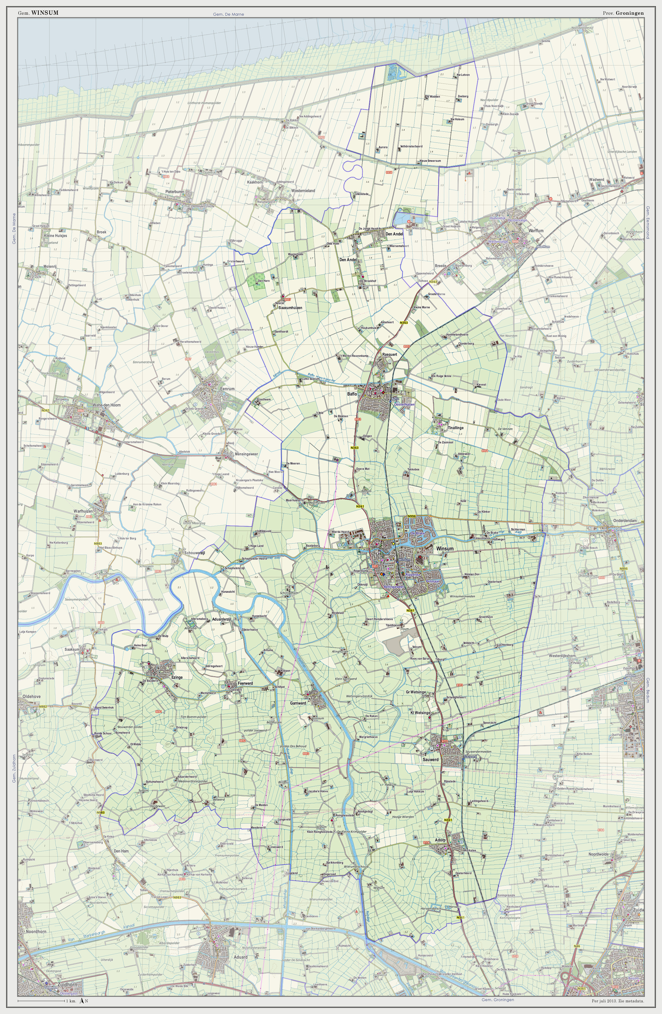 Topografische kaart van gemeente Winsum (2013). Samengesteld door Jan-Willem van Aalst op basis van de GML open geodata van de BRT/Top10NL (basisregistratie Topografie, Kadaster 2011), vrijgegeven door Kadaster onder de Creative Commons BY licentie. Additionele gegevens uit BAG (8 juli 2013), uit de Open Street Map (9 juli 2013) en uit de Risicokaart. Peildatum kaartbeeld: 9 juli 2013. Zie ook Gemeentenatlas.nl Samenstelling en kleurenschema: Jan-Willem van Aalst, met QuantumGIS en Photoshop. Zie ook de Legenda.